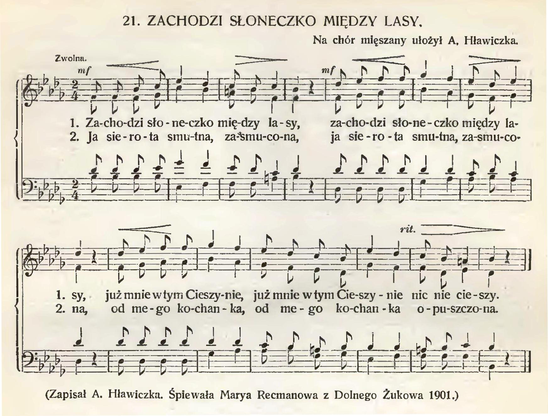 Folk song "Zachodzi Słoneczko Między Lasy" adapted by Andrzej Hławiczka